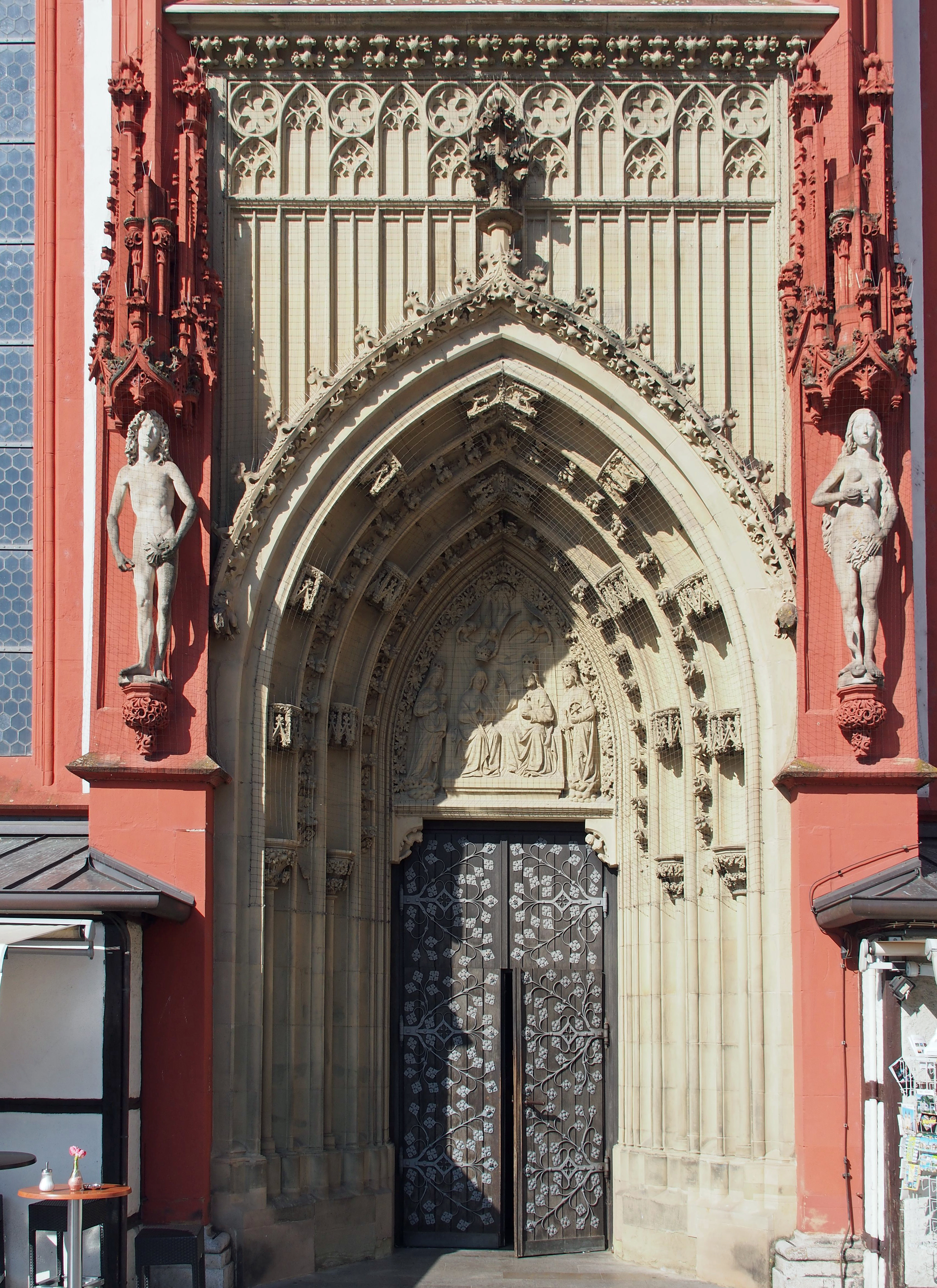 Südportal der Marienkapelle Würzburg mit "Adam" und "Eva", Kopien der Sandsteinfigur von Tilman Riemenschneider (1492-1493). Jetziger Standort der Originale: Mainfränkisches Museum auf der Festung Marienberg.